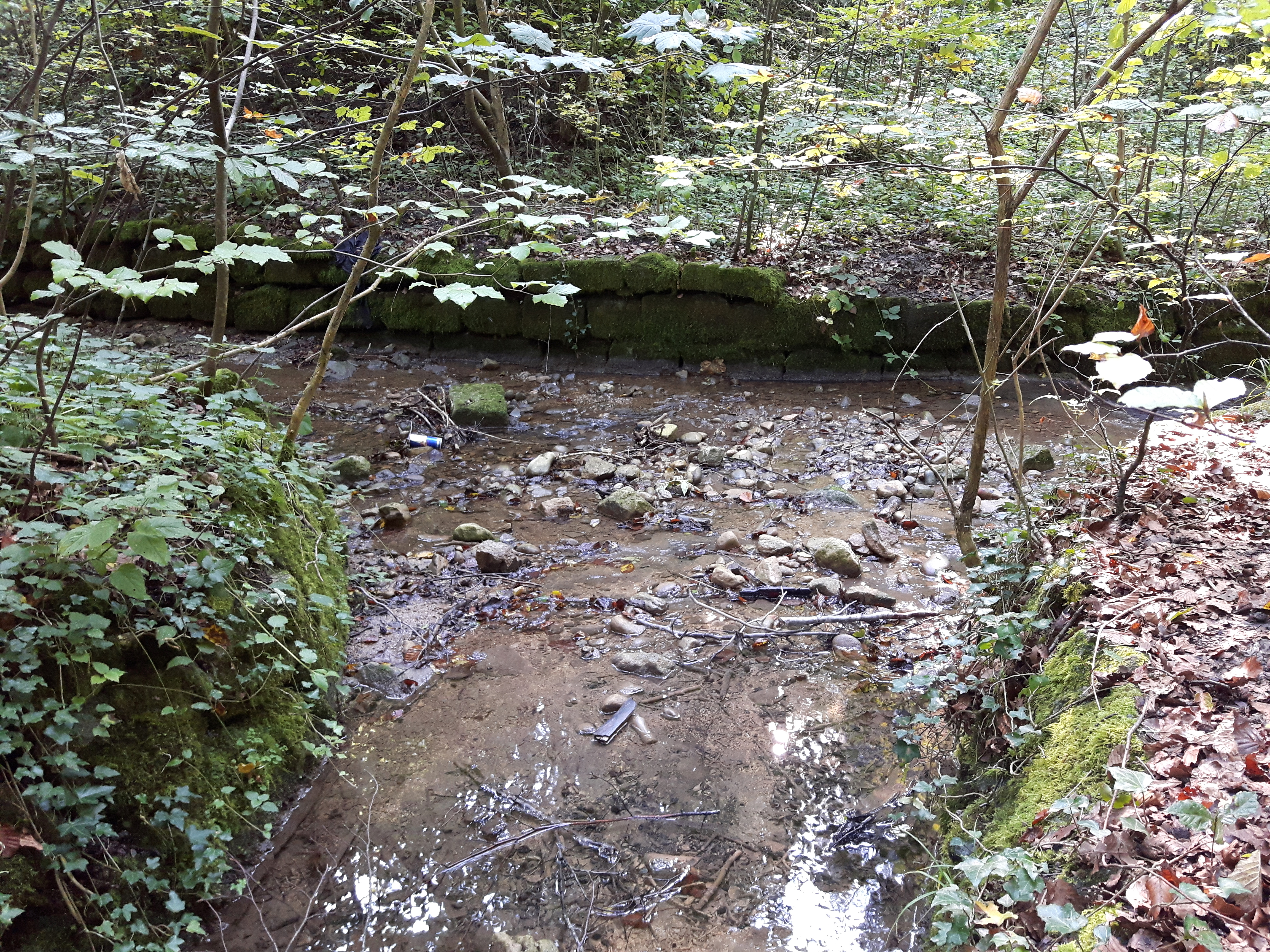 Mündung des Weidtobelbachs in den Fürtlibach im Loch zwischen Zürich (links) und Oberengstringen (rechts)